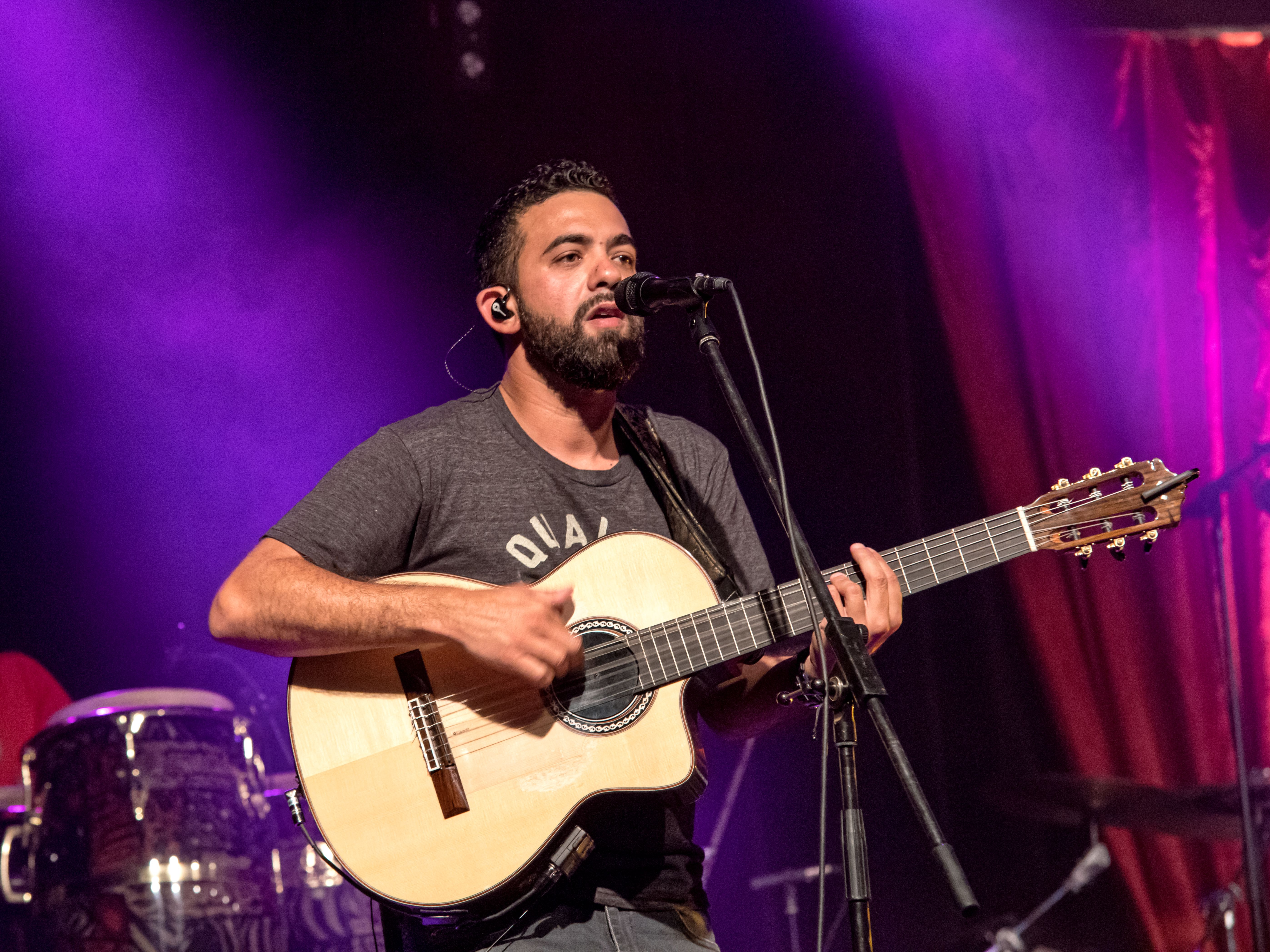 Bilder vom Zelt Musik Festival 2016 in Freiburg im Breisgau Gipsy Kings